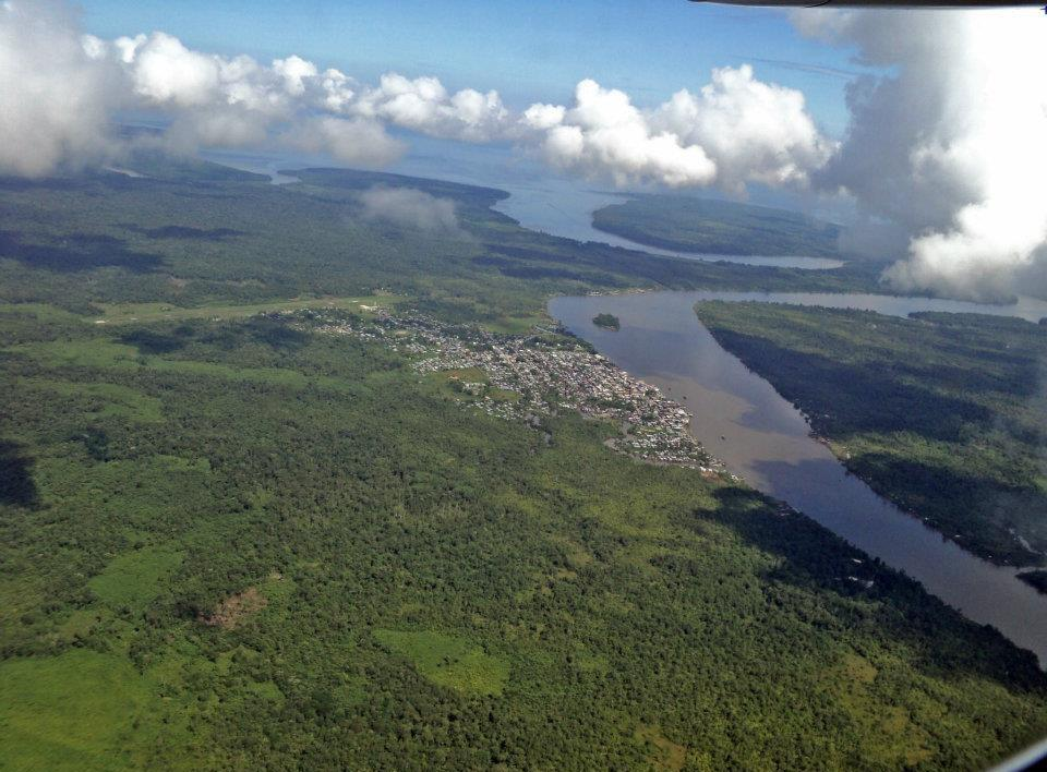 Guapí vista aérea